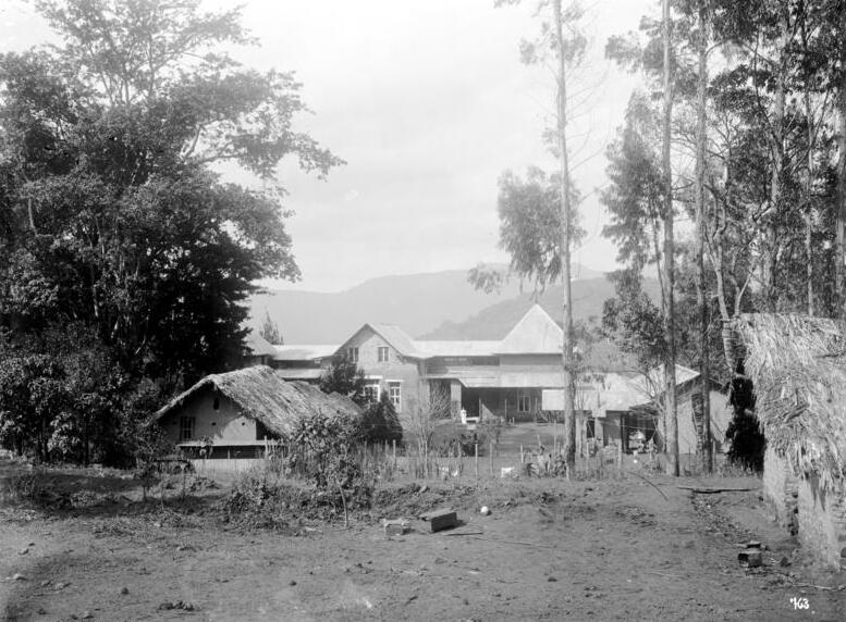 Pflanzung Sakkarani in Usambara, das Herrenhaus, Hofansicht